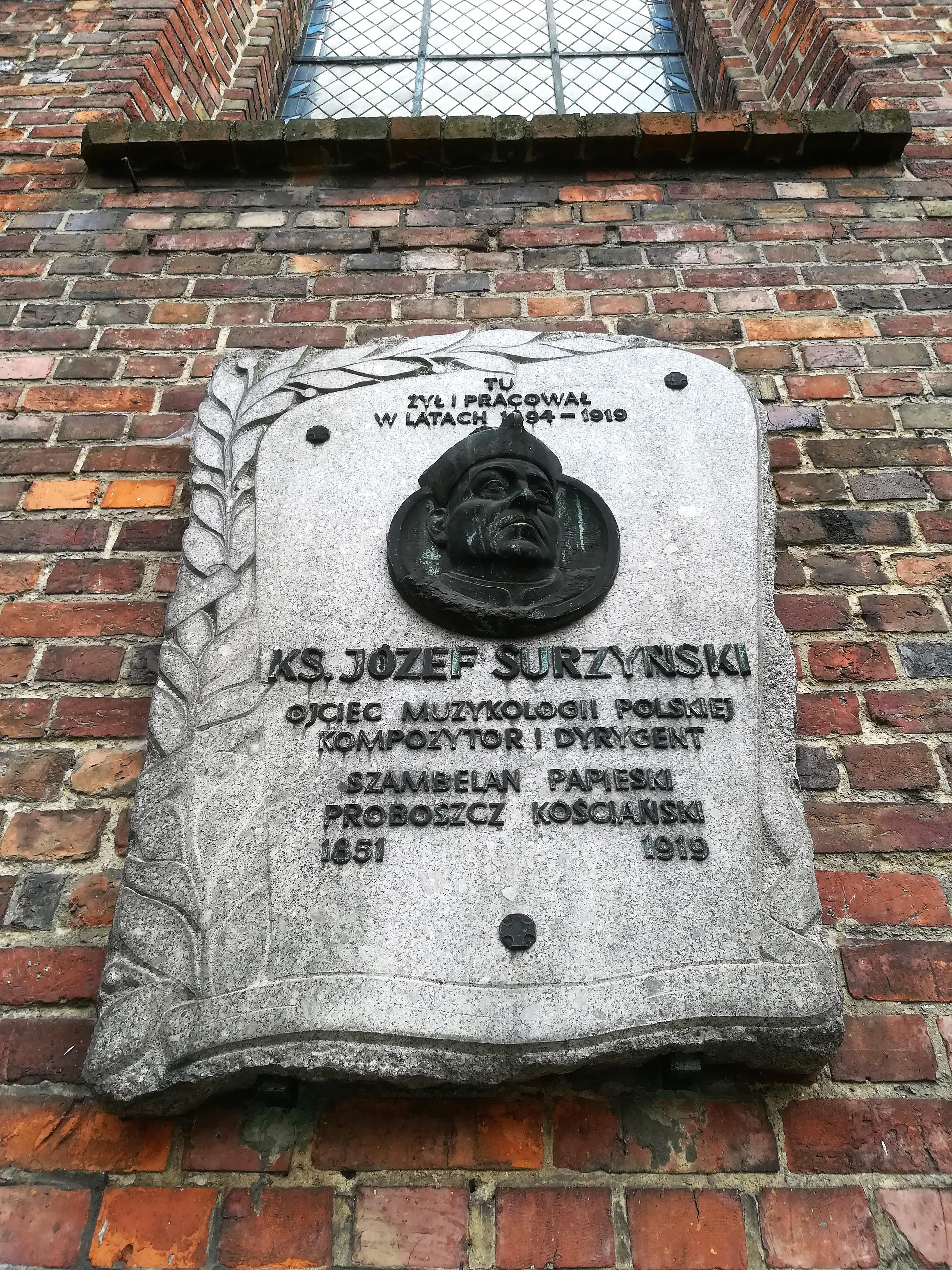 Kościół farny w Kościanie.